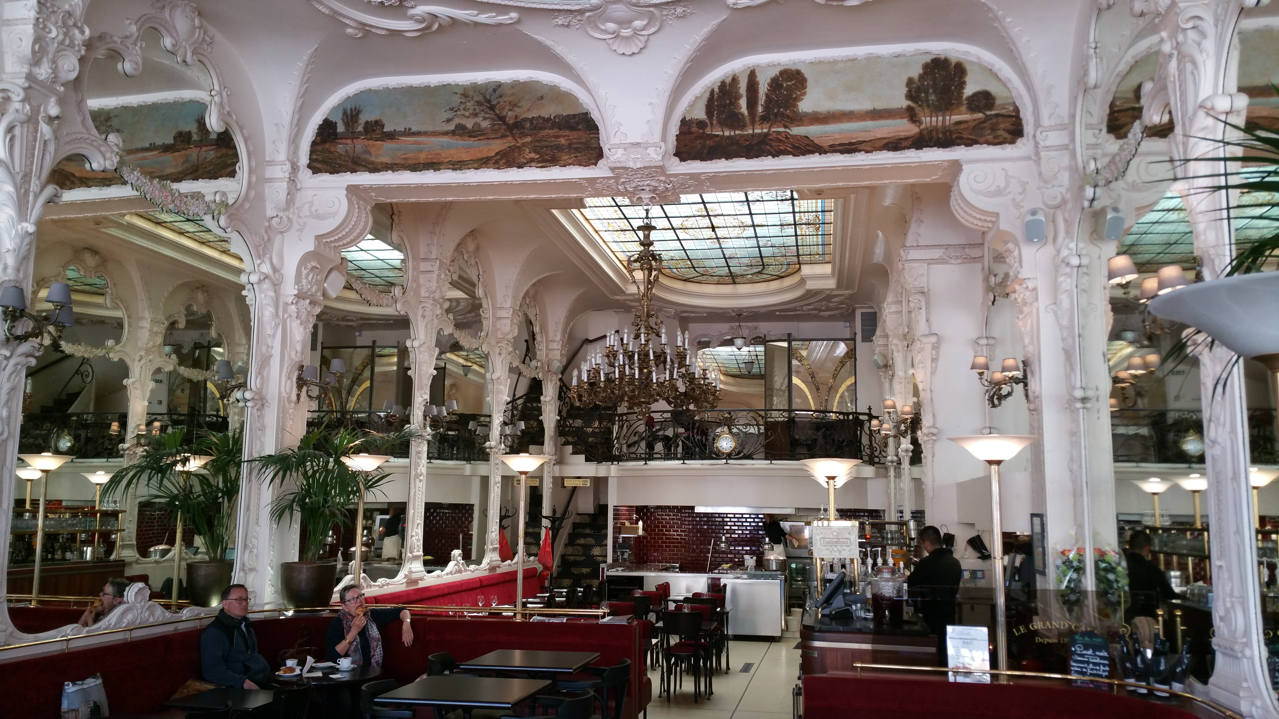 Le Grand café à Moulins (Allier)